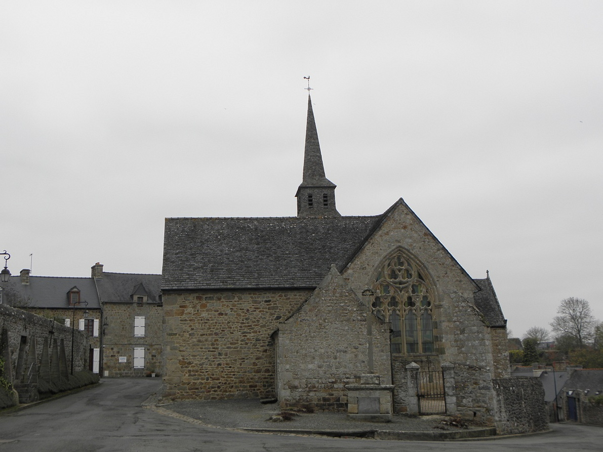 Chevet de la chapelle N.D. du Tertre en Châtelaudren (22).